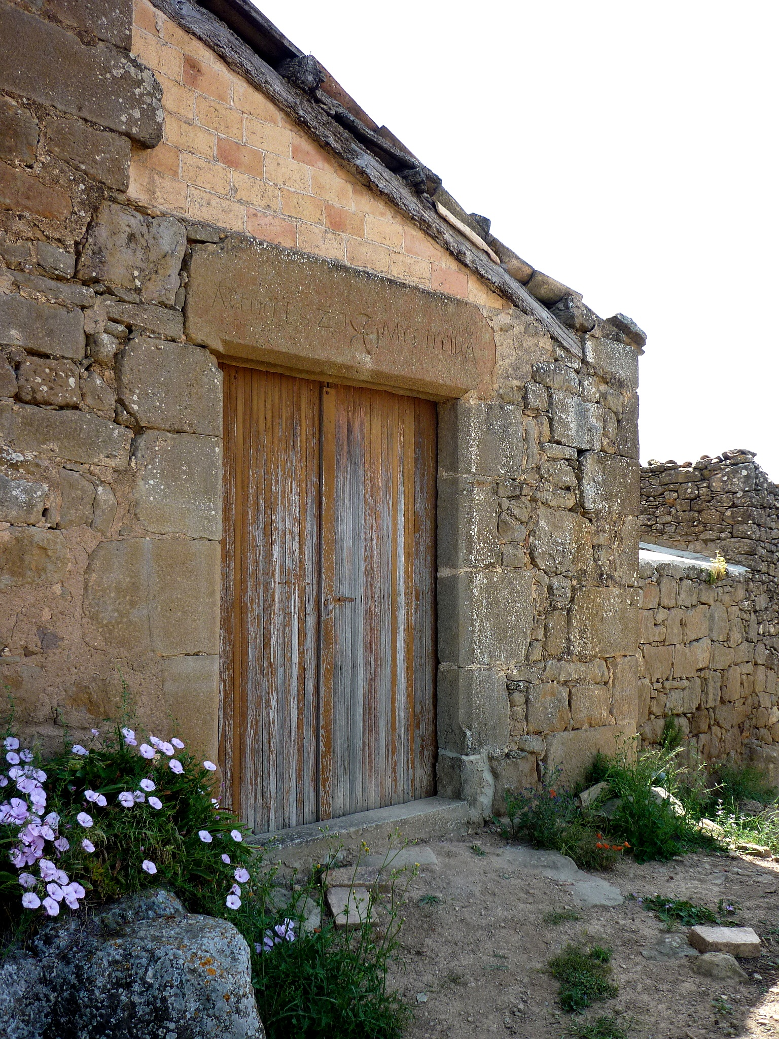 Mas Pinyols (Torà): baluart d'entrada amb inscripció a la llinda